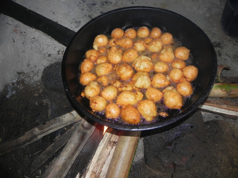 Les étapes de la préparation des beignets à base de farine de blé